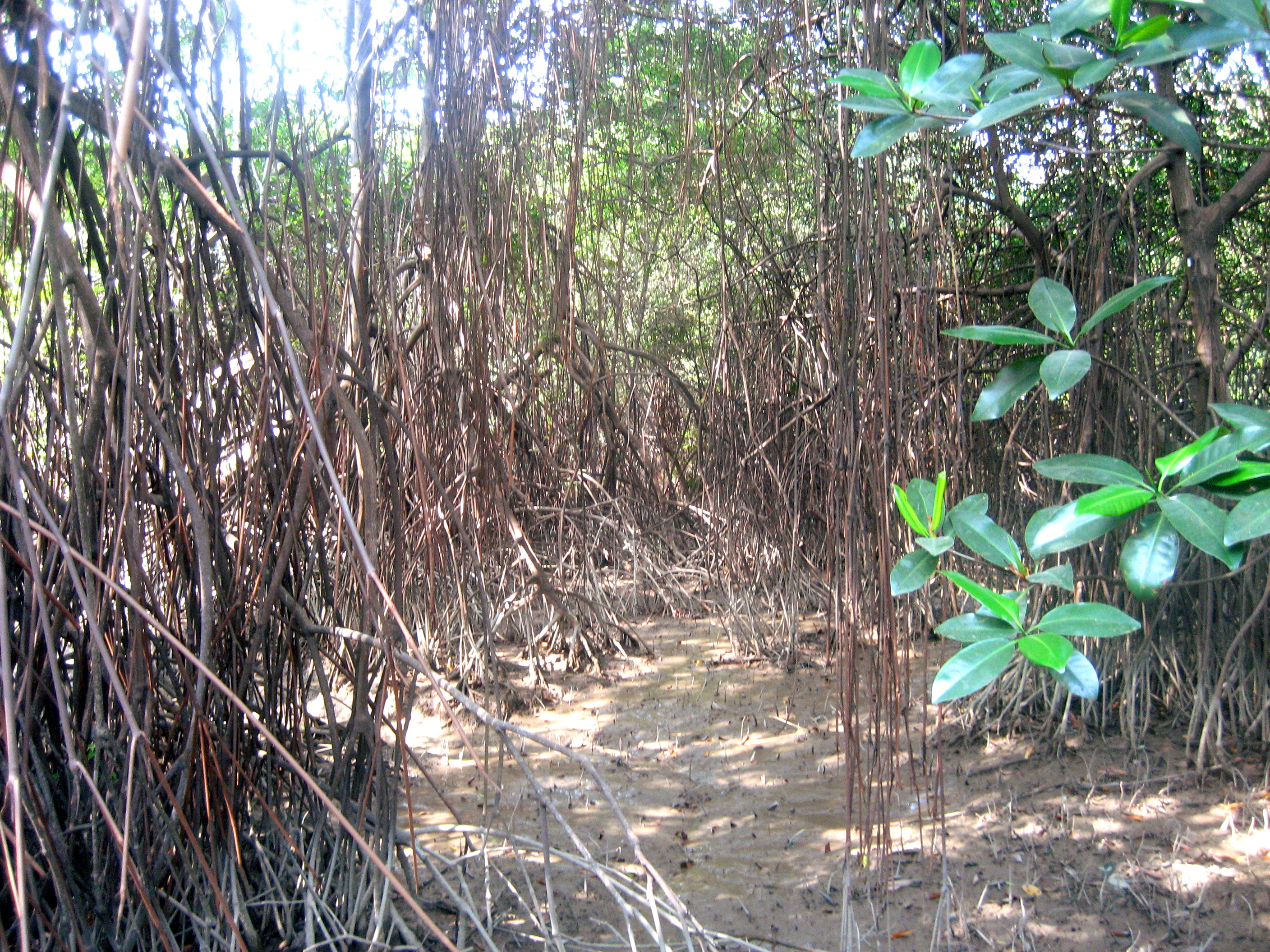 Foto de un manglar en el Parque Histórico Guayaquil